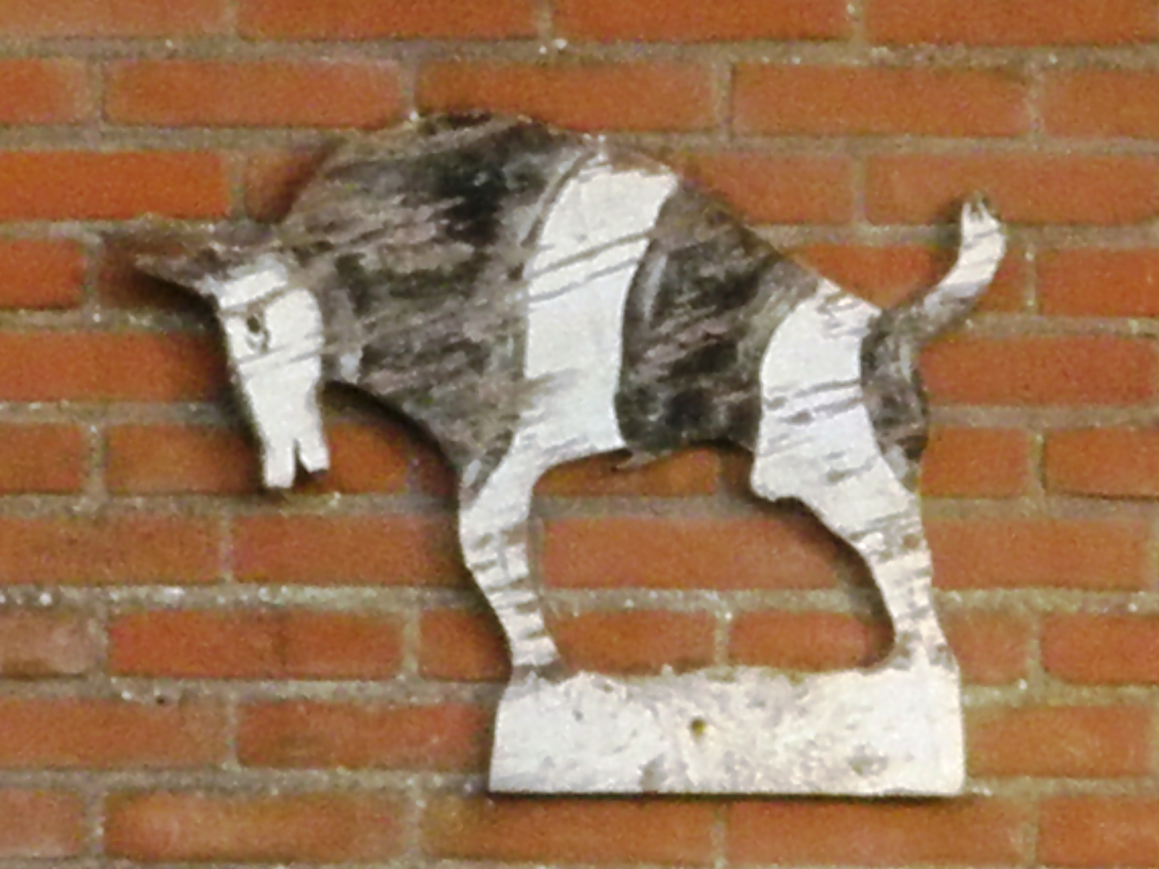 Een Willeskopper Stier als teken van verzet tegen het opgaan van de gemeente Willeskop in de gemeente Montfoort. Veel bewoners hadden een dergelijke stier aan hun huis bevestigd. De stier op de foto hangt aan de stal van Blokland nr. 88.